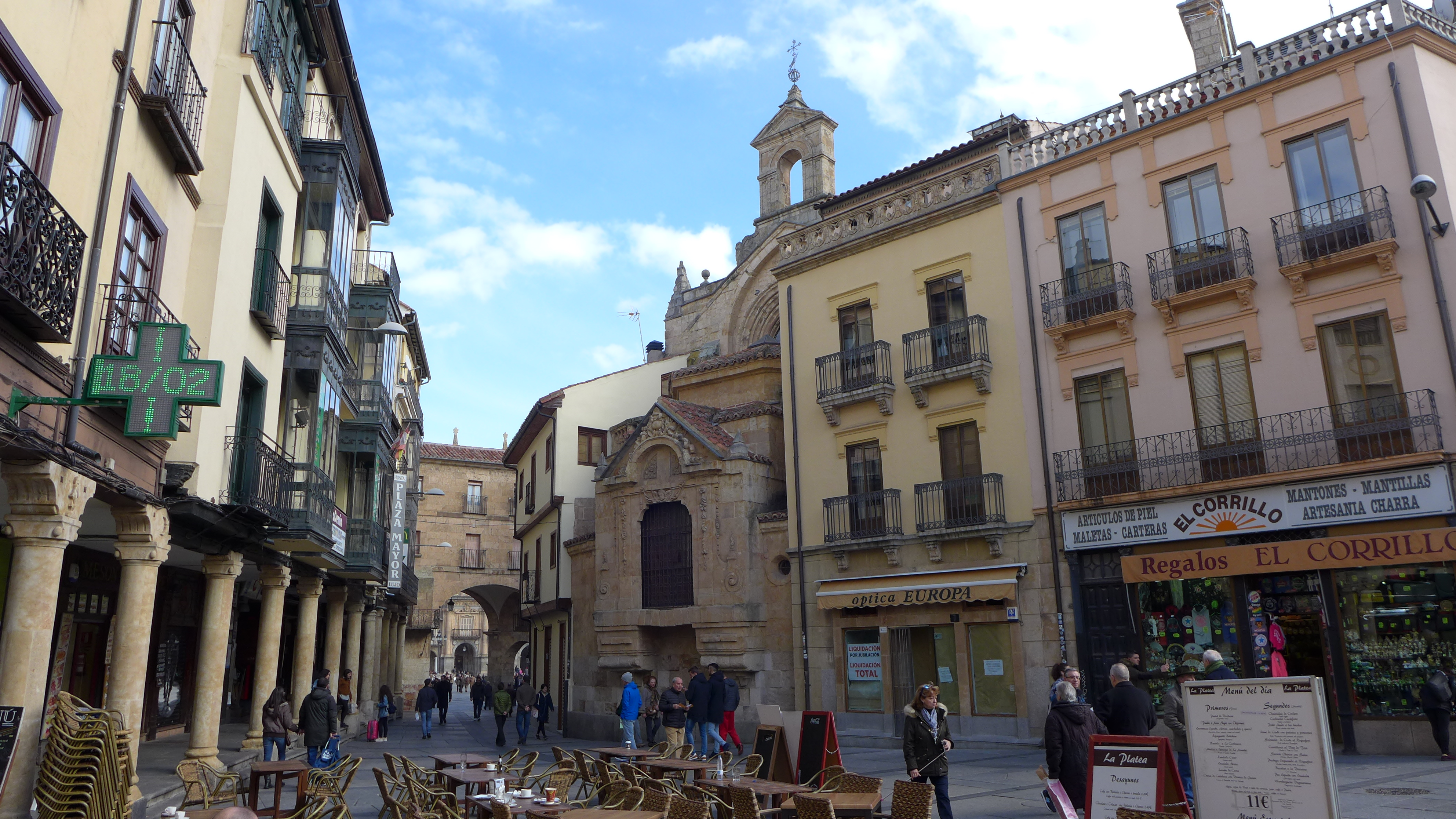 Salamanca